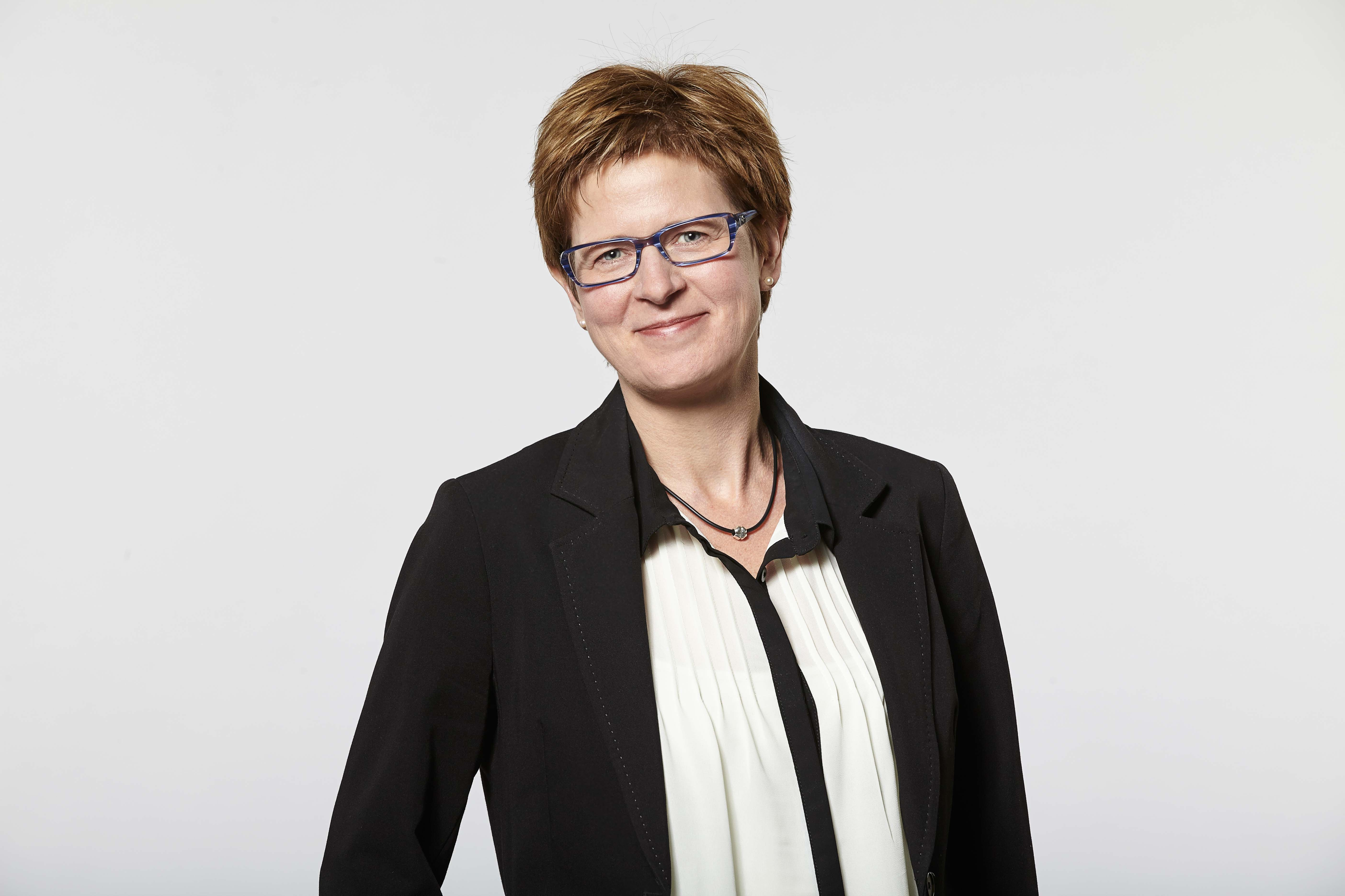 Ulla Astman